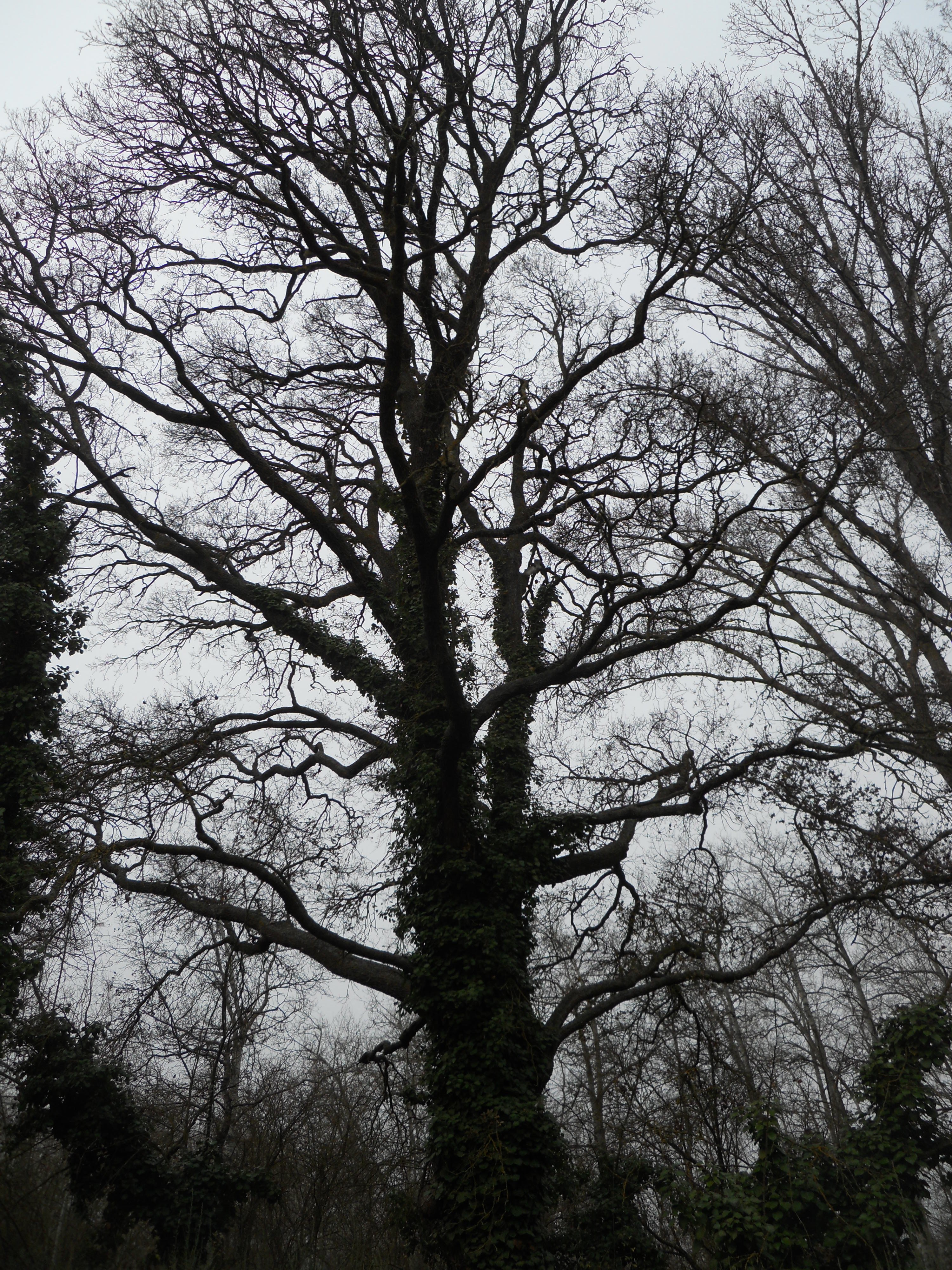 Roble centenario